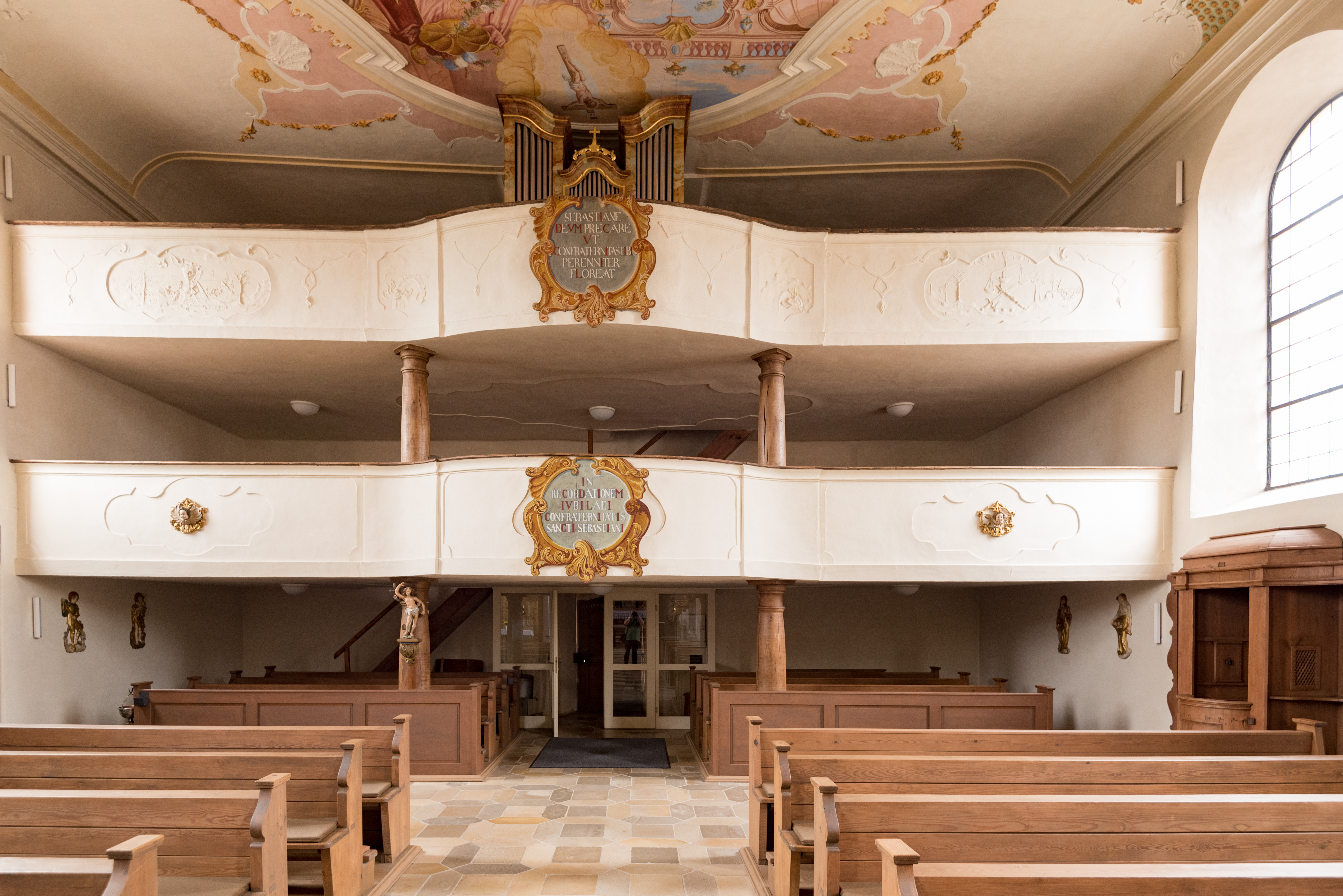 Wolframs-Eschenbach, Waizendorfer Straße 14